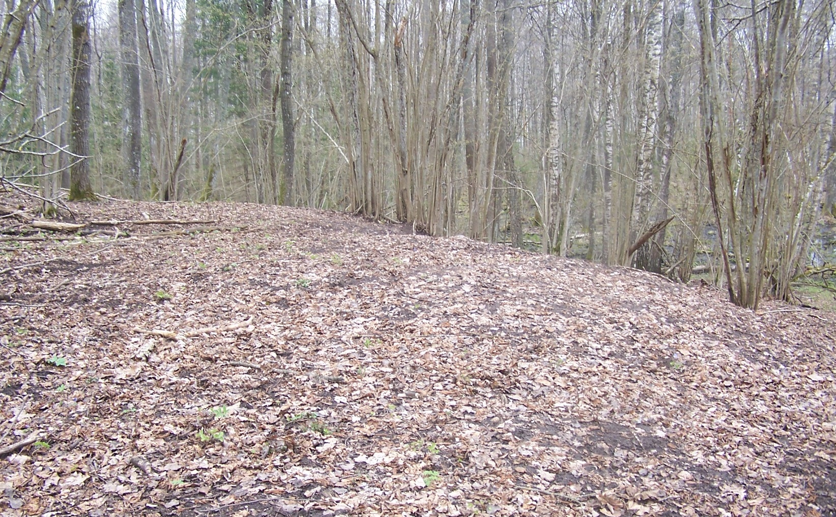 Obonių piliakalnio fragmentas